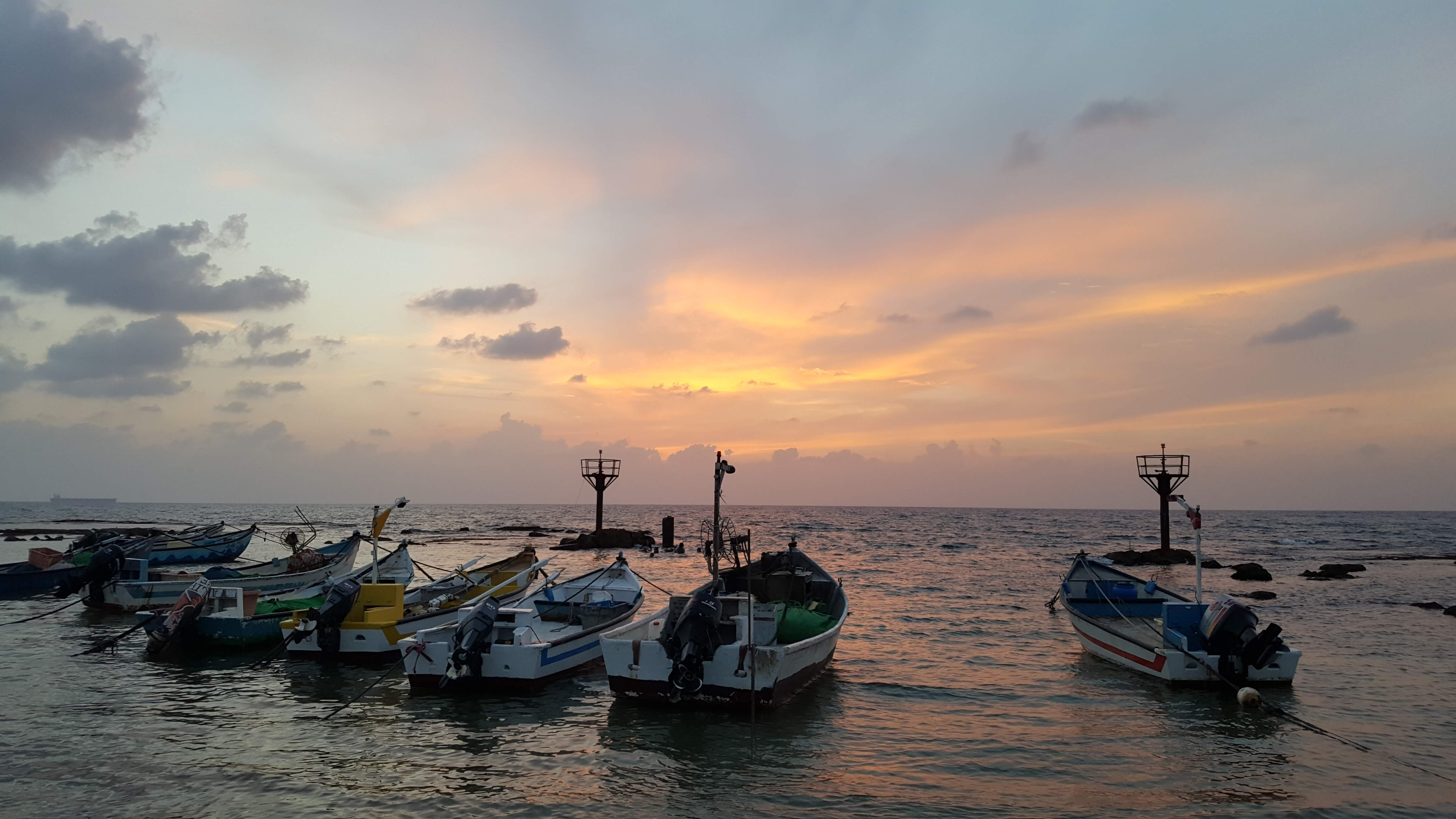 ג'סר א-זרקא - תל תנינים